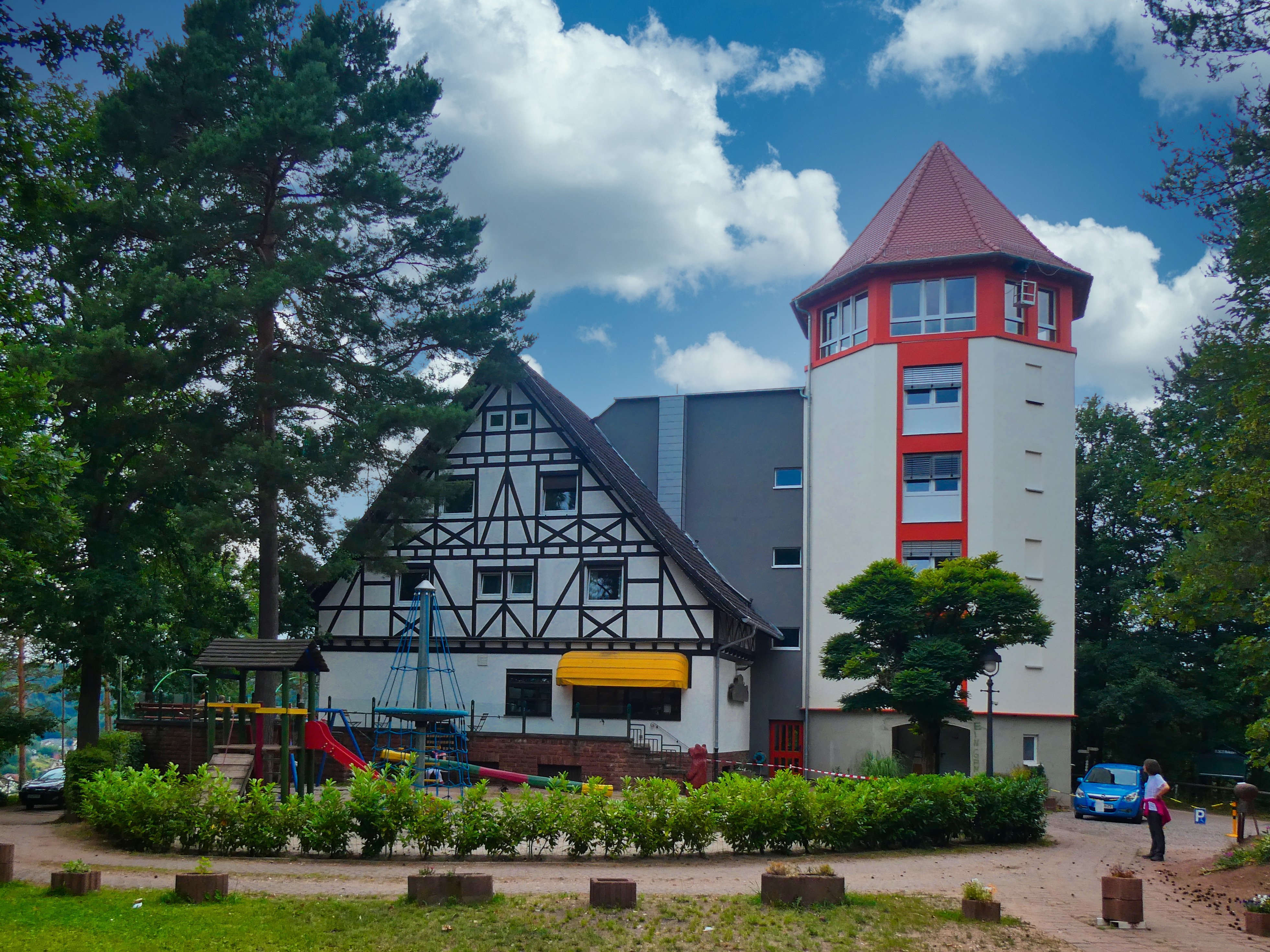 Hilschberghaus im Naturpark Pfälzerwald am Rodalbener Felswanderweg